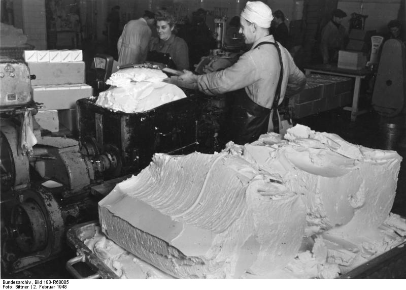 Berlin, Märkische Margarinefabrik Illus-Bittner Die Versorgung Berlins. 2.2.48 Bei der Märkischen Margarine-Fabrik. Eine der im Betrieb befindlichen 3 Packmaschinen, mit der pro Stunde 30 Ztr. Margarine zur Verpackung kommen. 1122-48